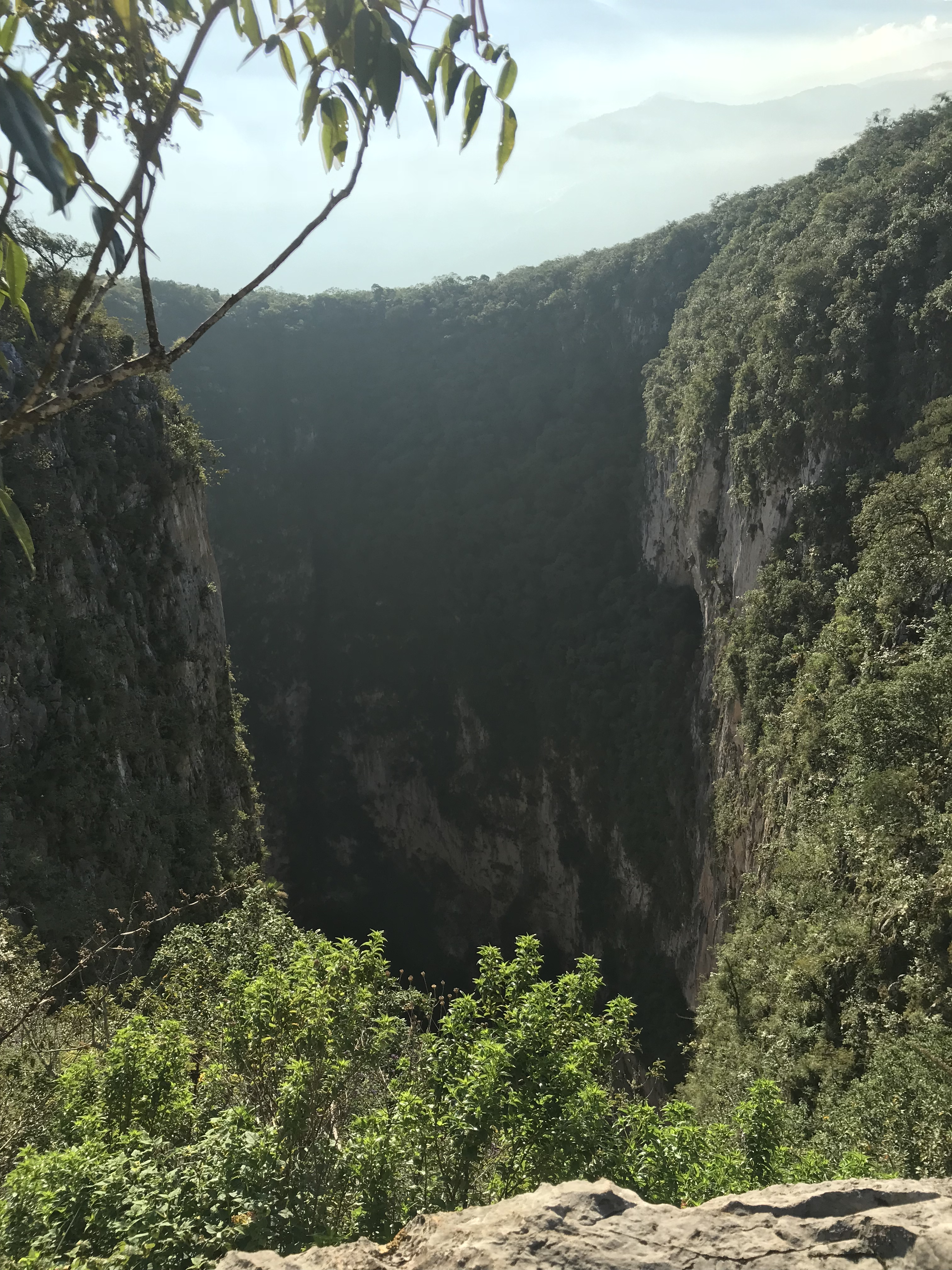 La vista frontal del Sótano de Barro, habitad protegida para el cuidado de la guacamaya verde